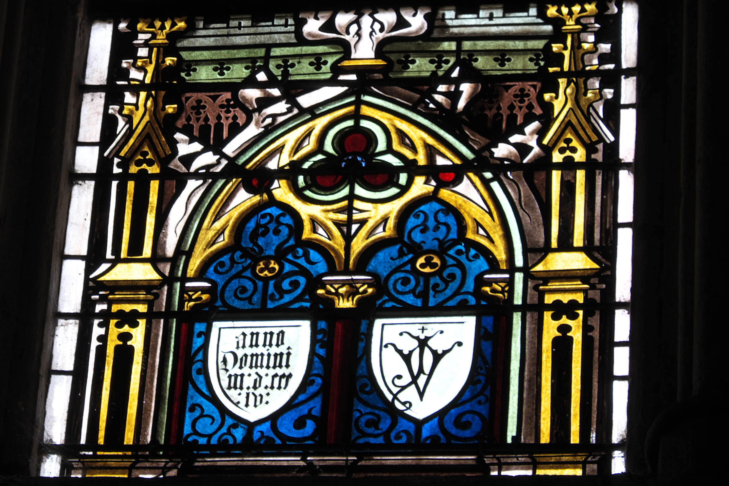 Ehemalige Kathedrale Saint-Jean-Baptiste (Johannes der Täufer) in Bazas im Département Gironde (Région Aquitaine/Frankreich), Bleiglasfenster (Fischfang) von Joseph Villiet, untere Scheibe mit der Jahreszahl MDCCCLV (1855) und der Signatur JV